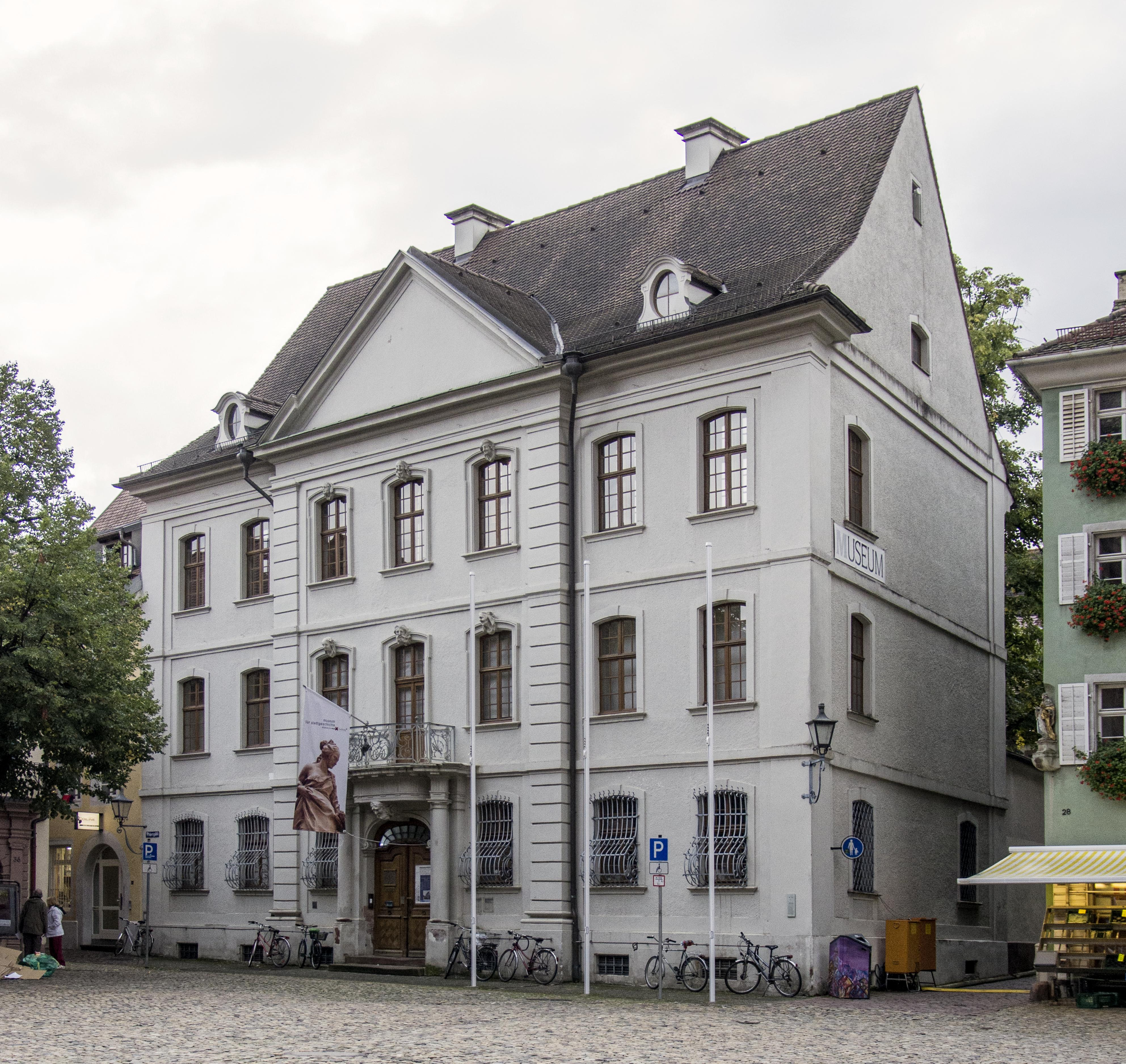 DFN Treffen am 12.09.2013 auf dem Freiburger Münsterplatz